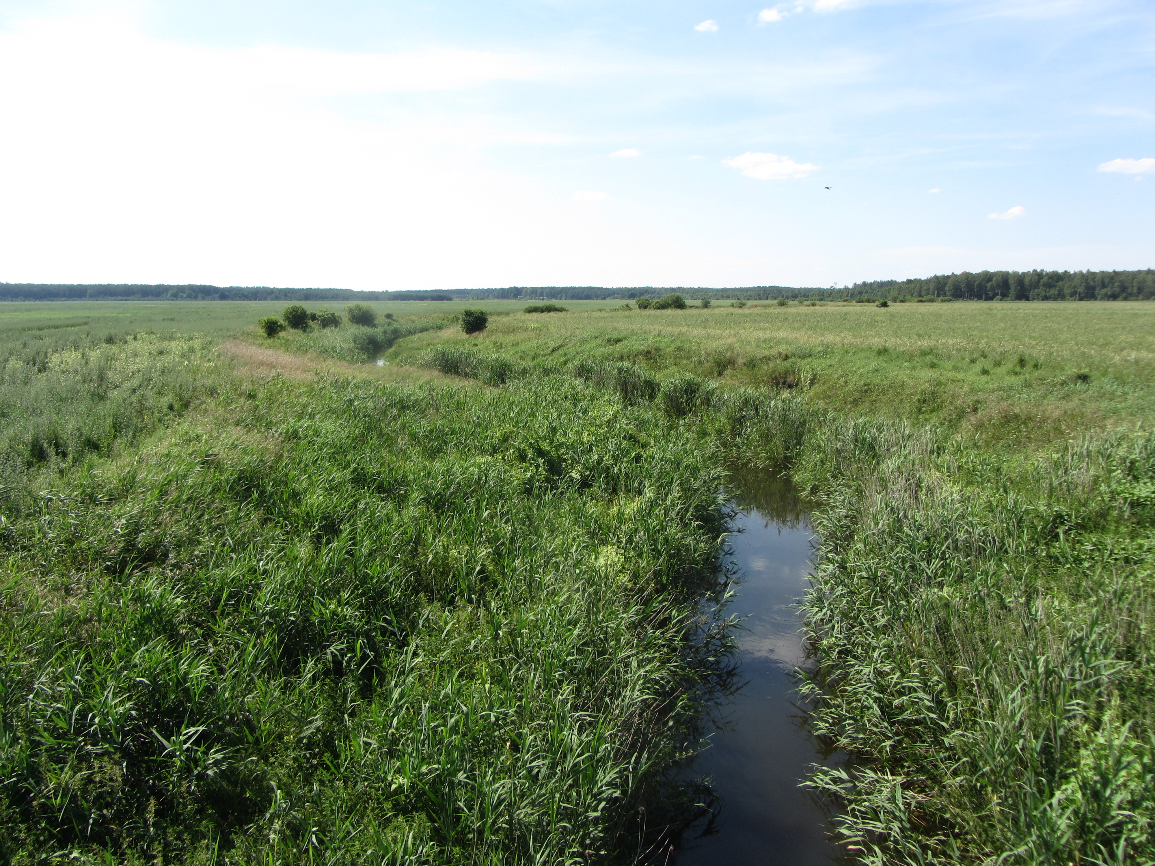 Kaniavos sen., Lithuania